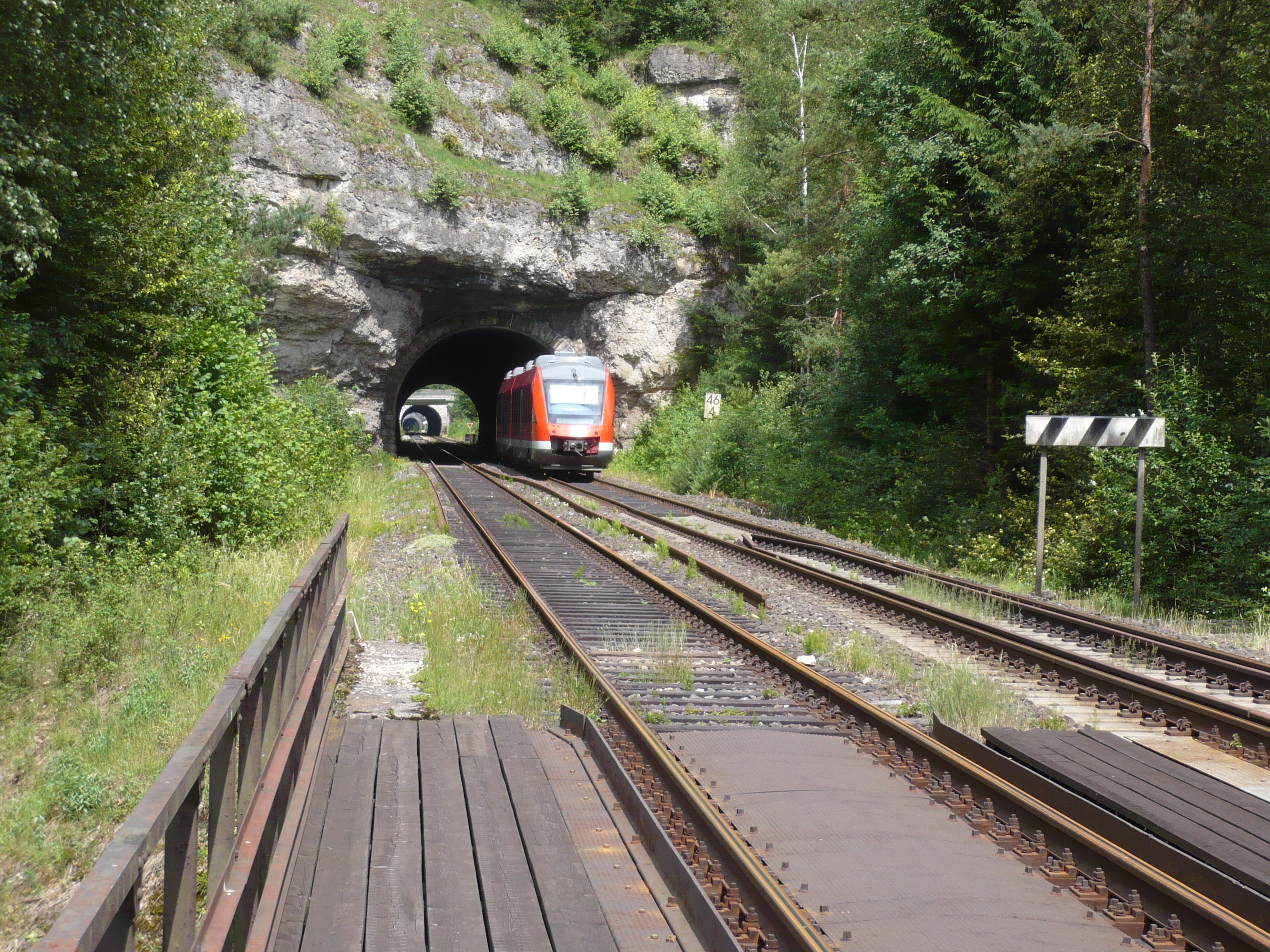 Fichtelgebirgsbahn im Pegnitztal